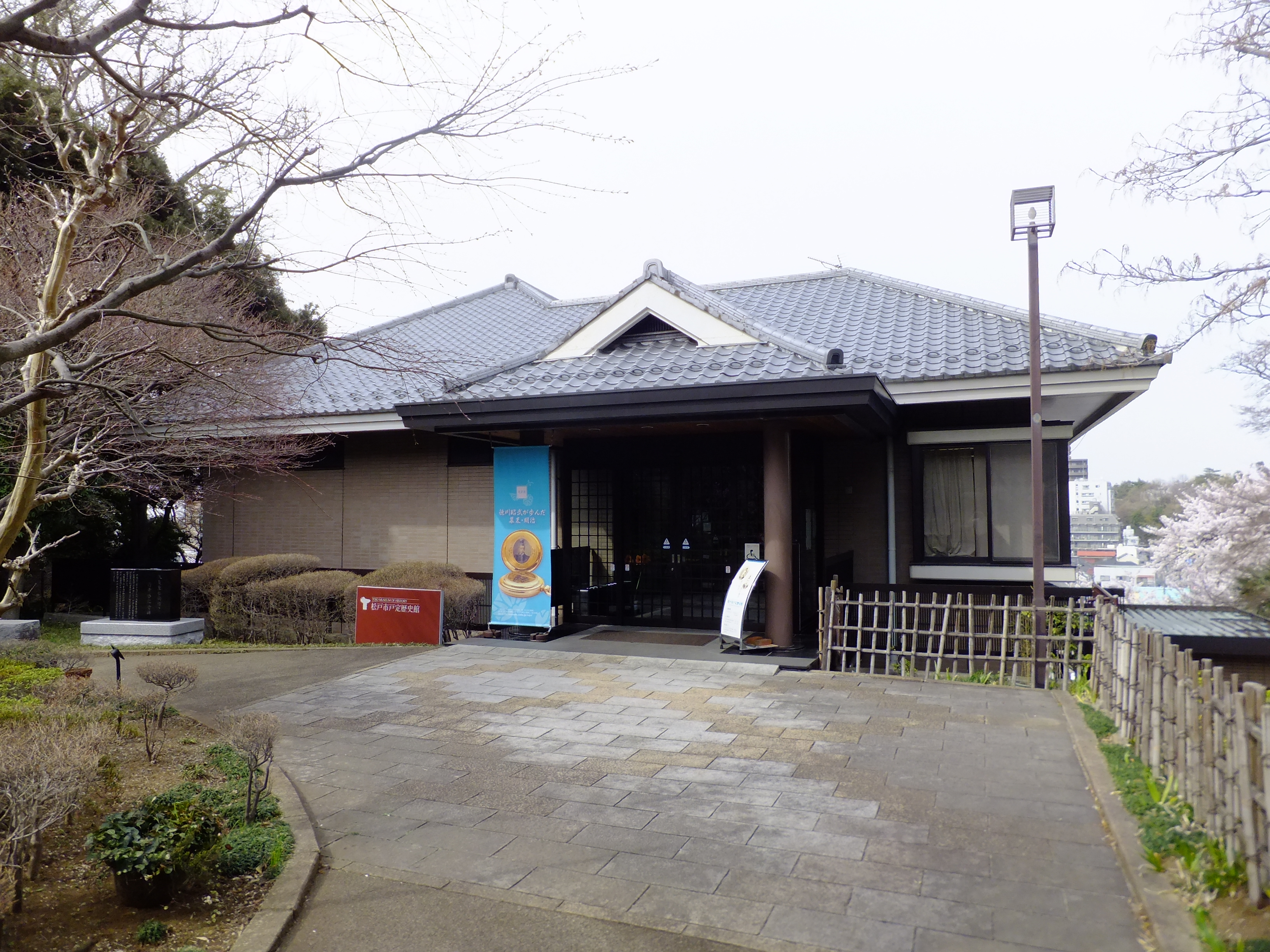 松戸市戸定歴史館